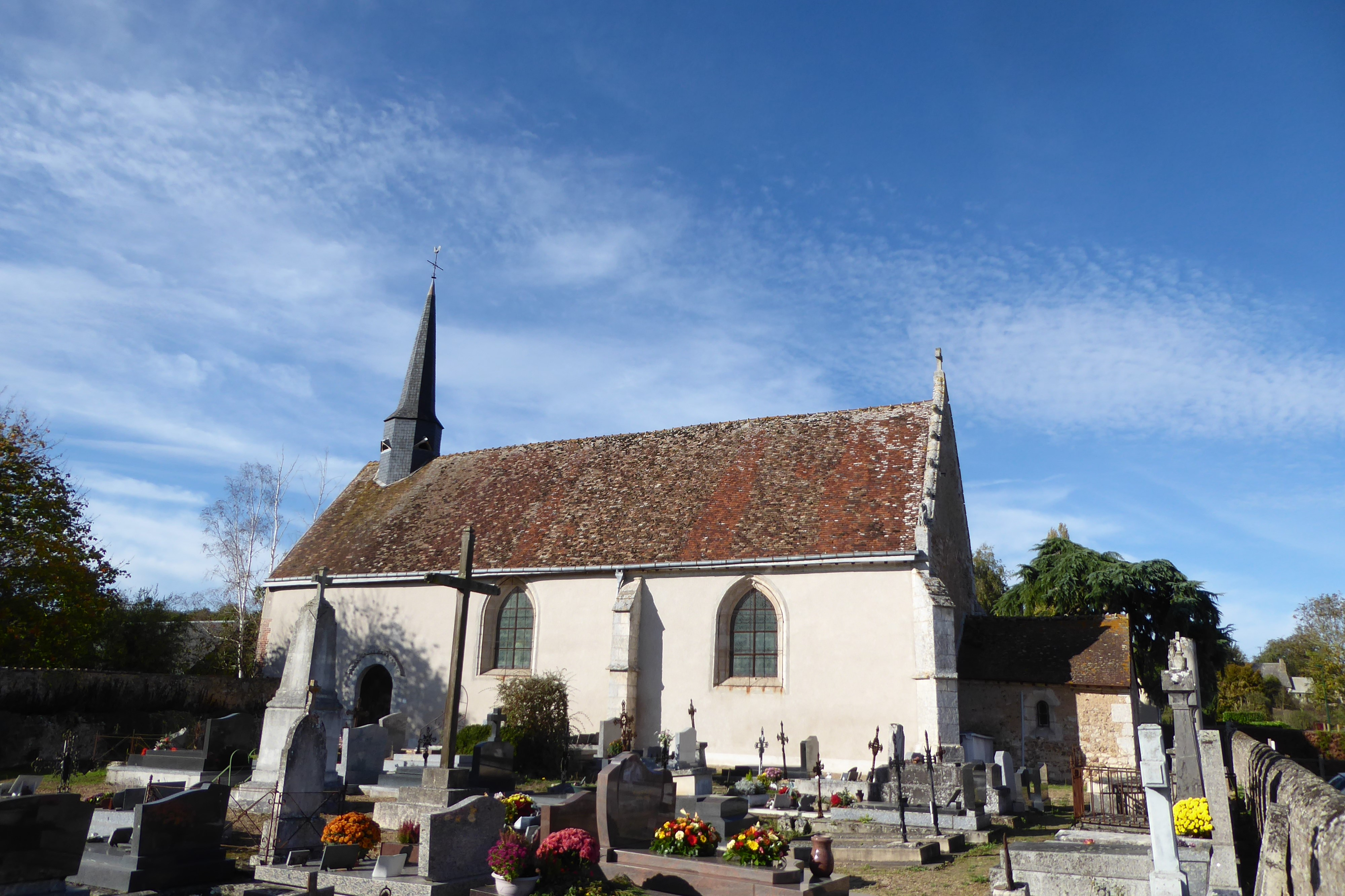 église Saint-Christophe de Saint-Christophe, Eure-et-Loir, France.